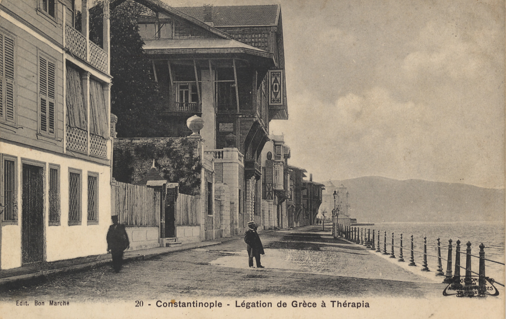 Legation of Greece in Tarabya, İstanbul SALT Research, Tahsin İspiroğlu Collection Tarabya’da Yunanistan Elçiliği, İstanbul SALT Araştırma, Tahsin İspiroğlu Koleksiyonu